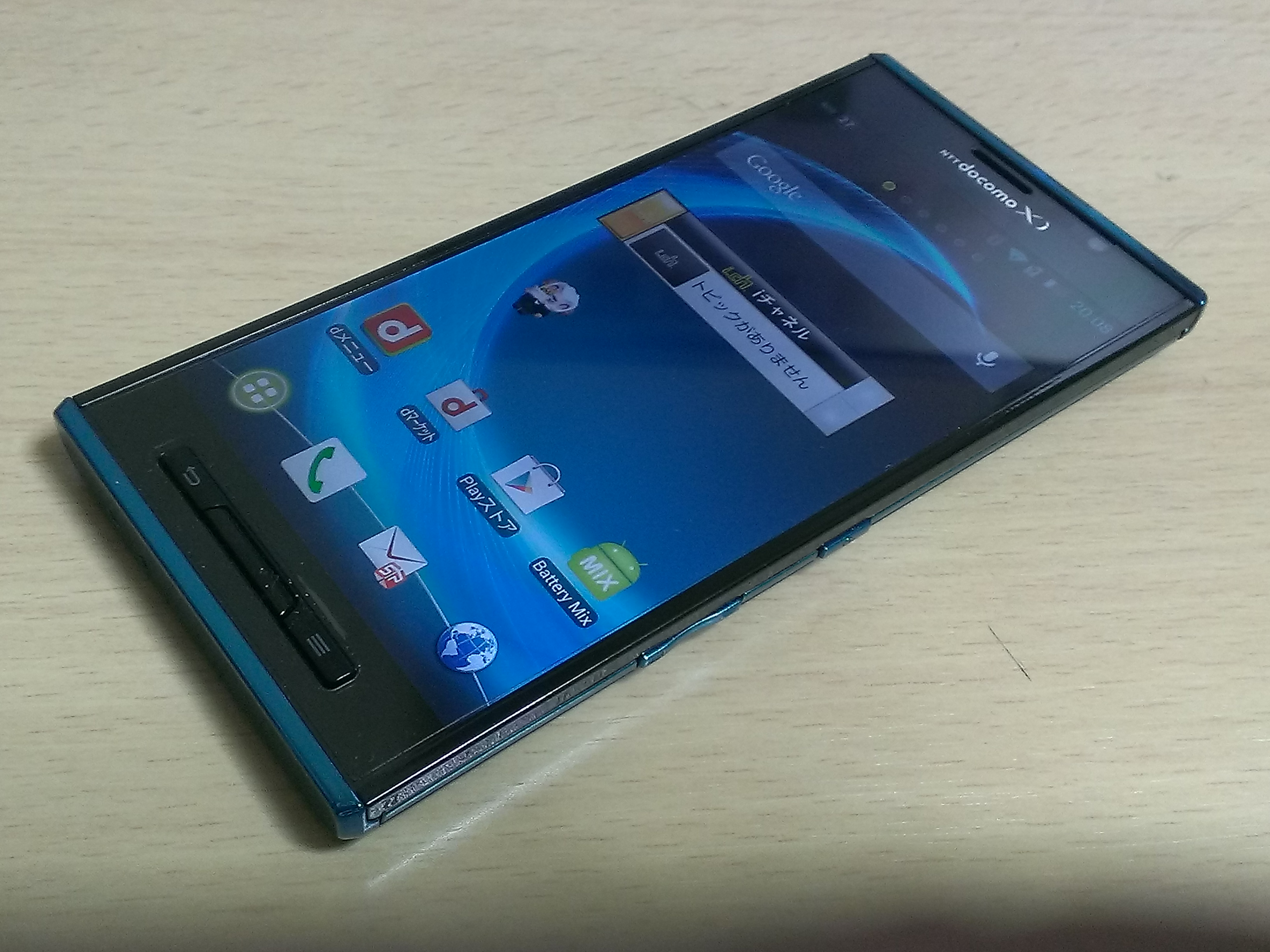 P-02E 表面